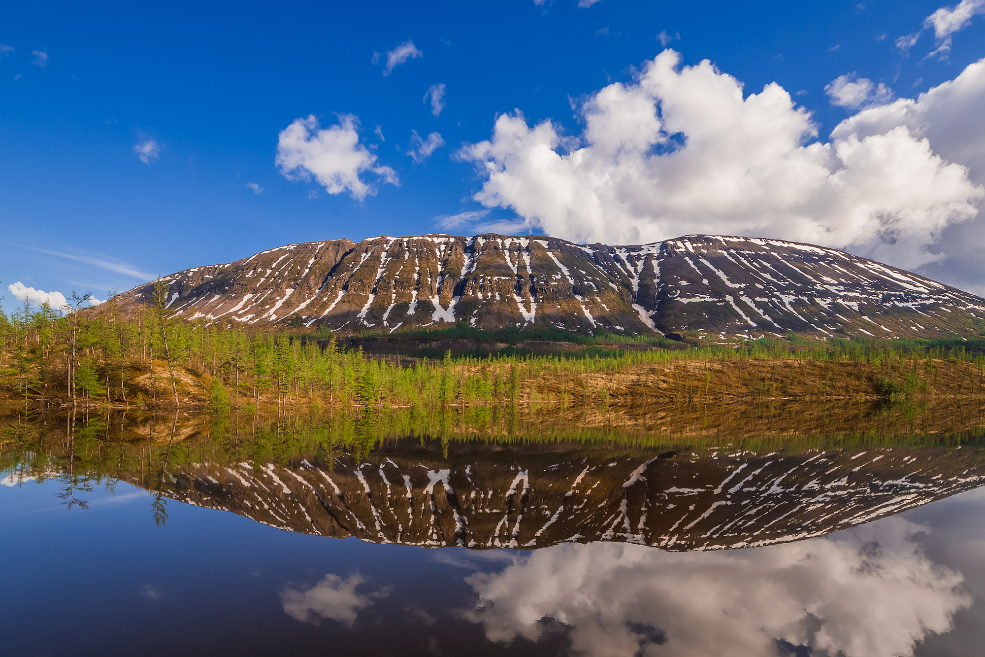 Путоранский заповедник: Заповедник в пределах плато Путорана, в северо-западной части Среднесибирского плоскогорья, южнее полуострова Таймыр, Красноярский край This image is related to the protected area of Russia number 2400003